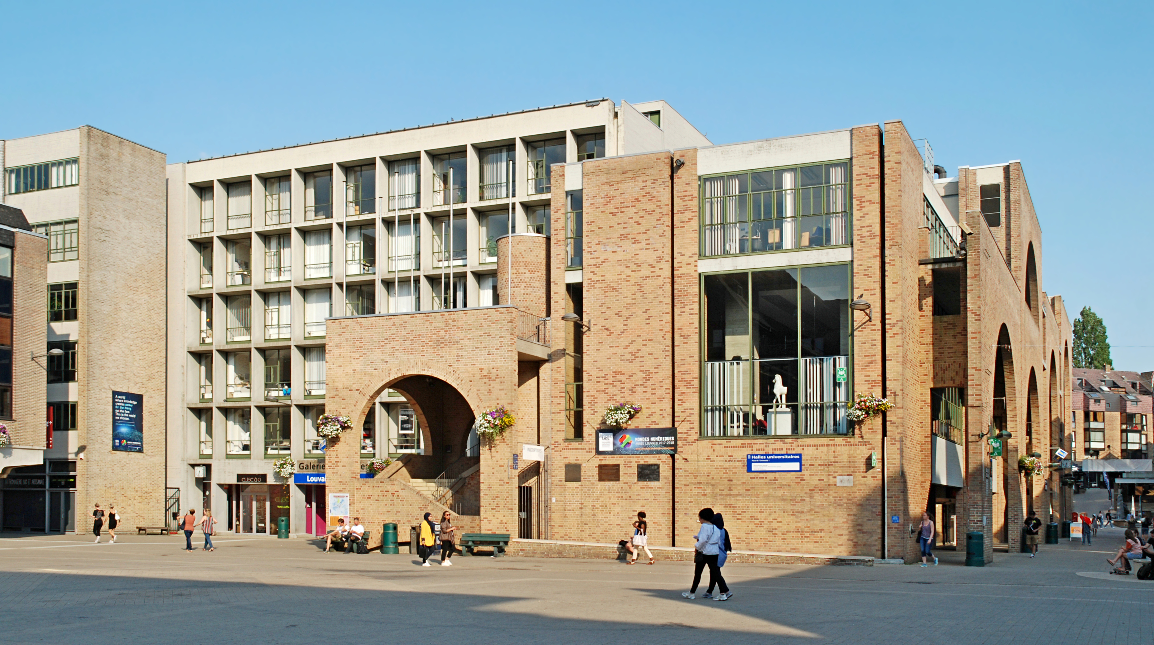 Belgique - Brabant wallon - Louvain-la-Neuve - Place de l'Université - Halles universitaires (architecture brutaliste, Yves Lepère et Joseph Polet, 1975-1976) This photo of immovable heritage has been taken in the Walloon Region